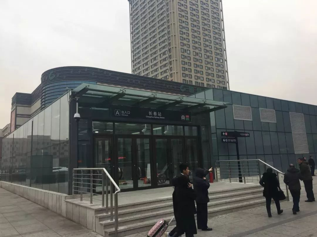 长春站站出入口